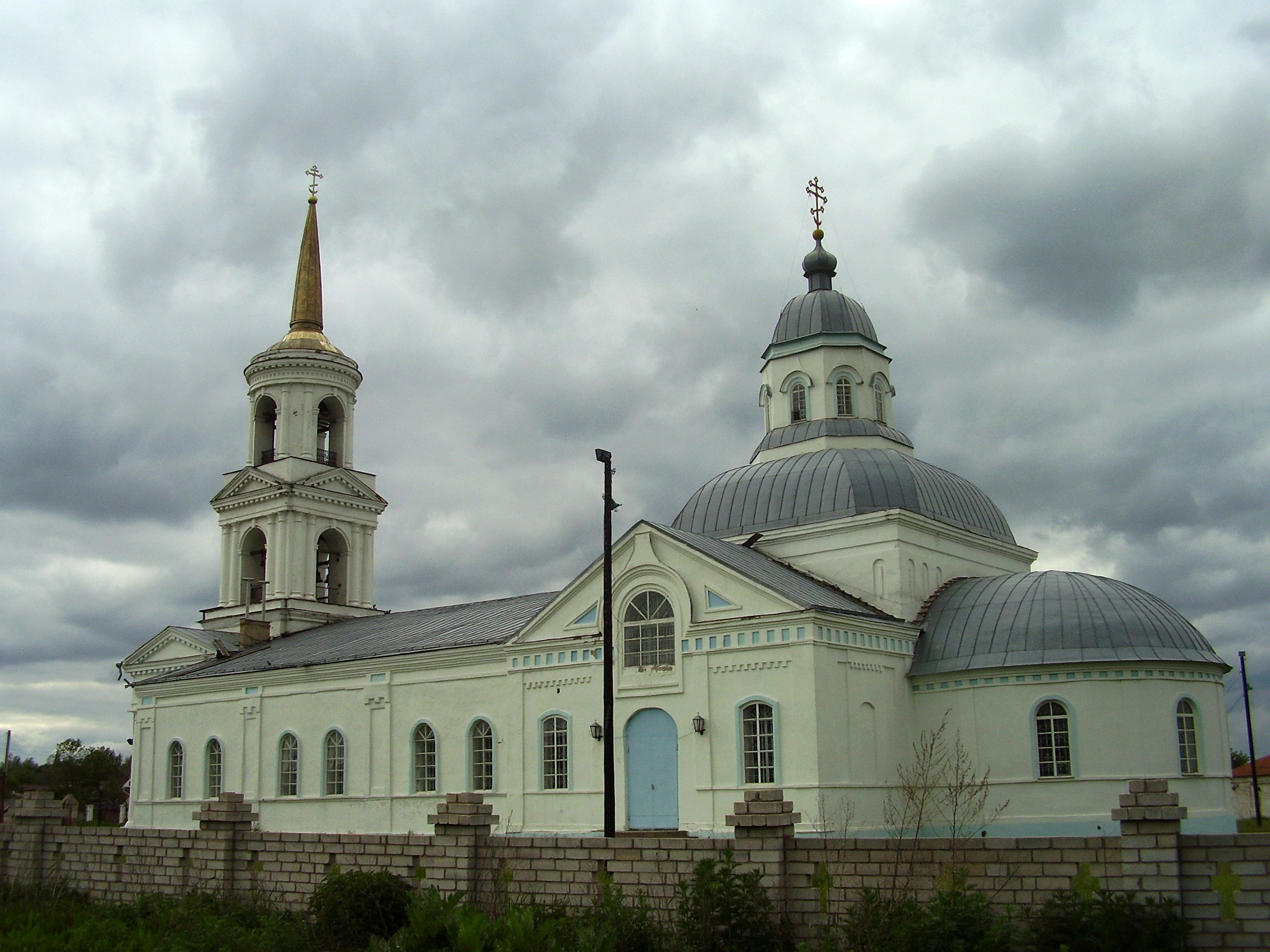 Н.Усмань. Храм Казанской иконы Божьей Матери